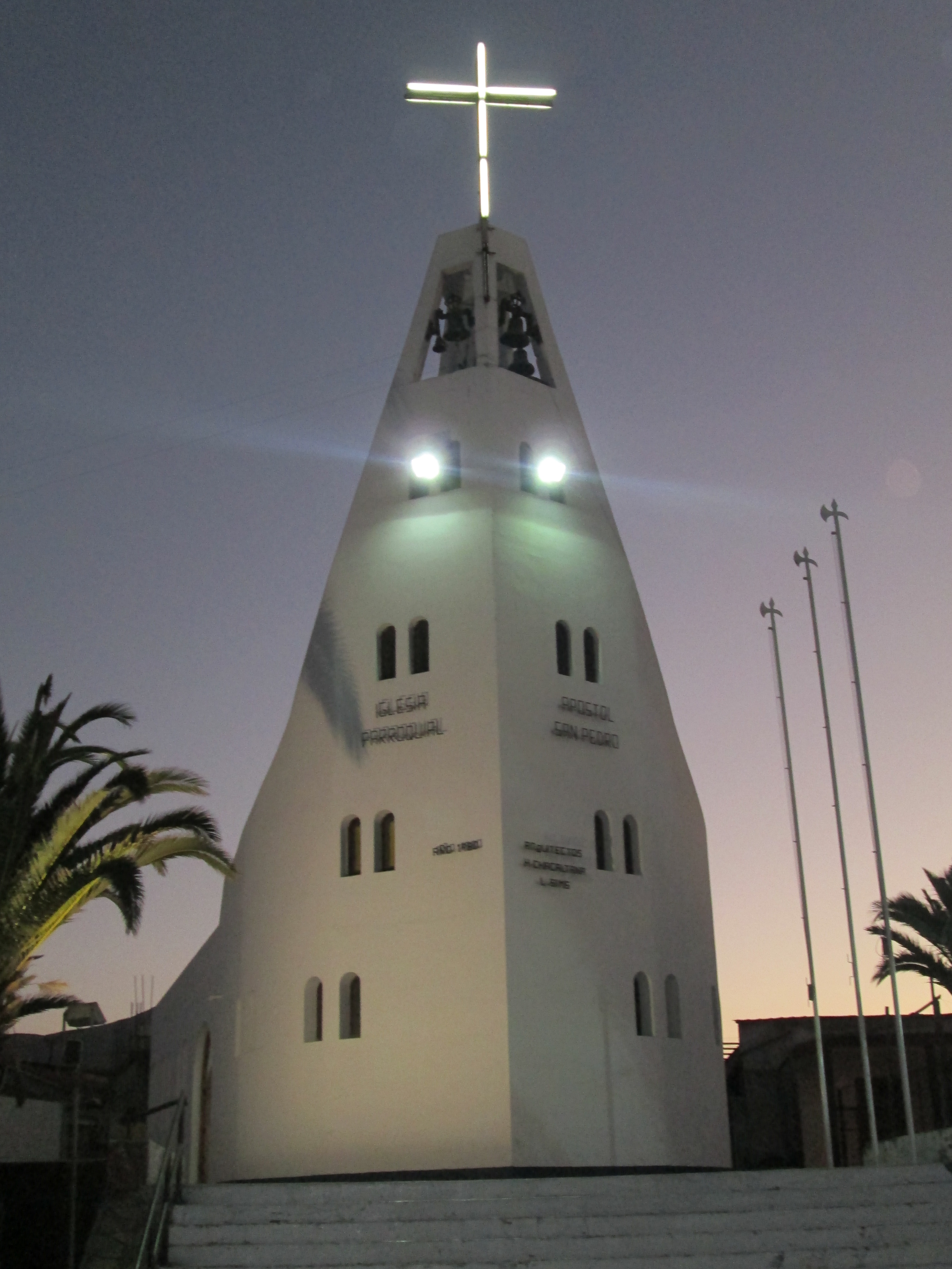 Huasco Iglesia noche